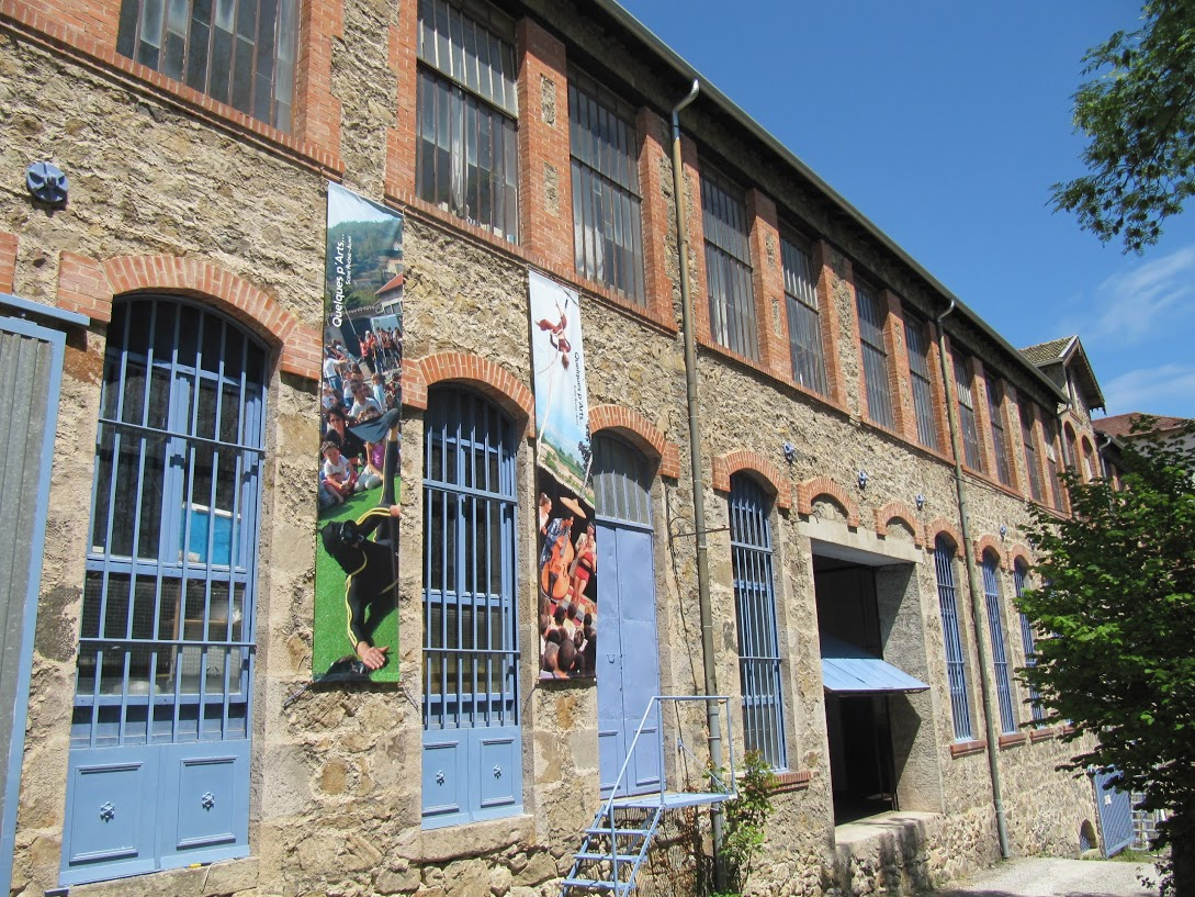 Usine Quelques p'Arts... Boulieu-lès-Annonay